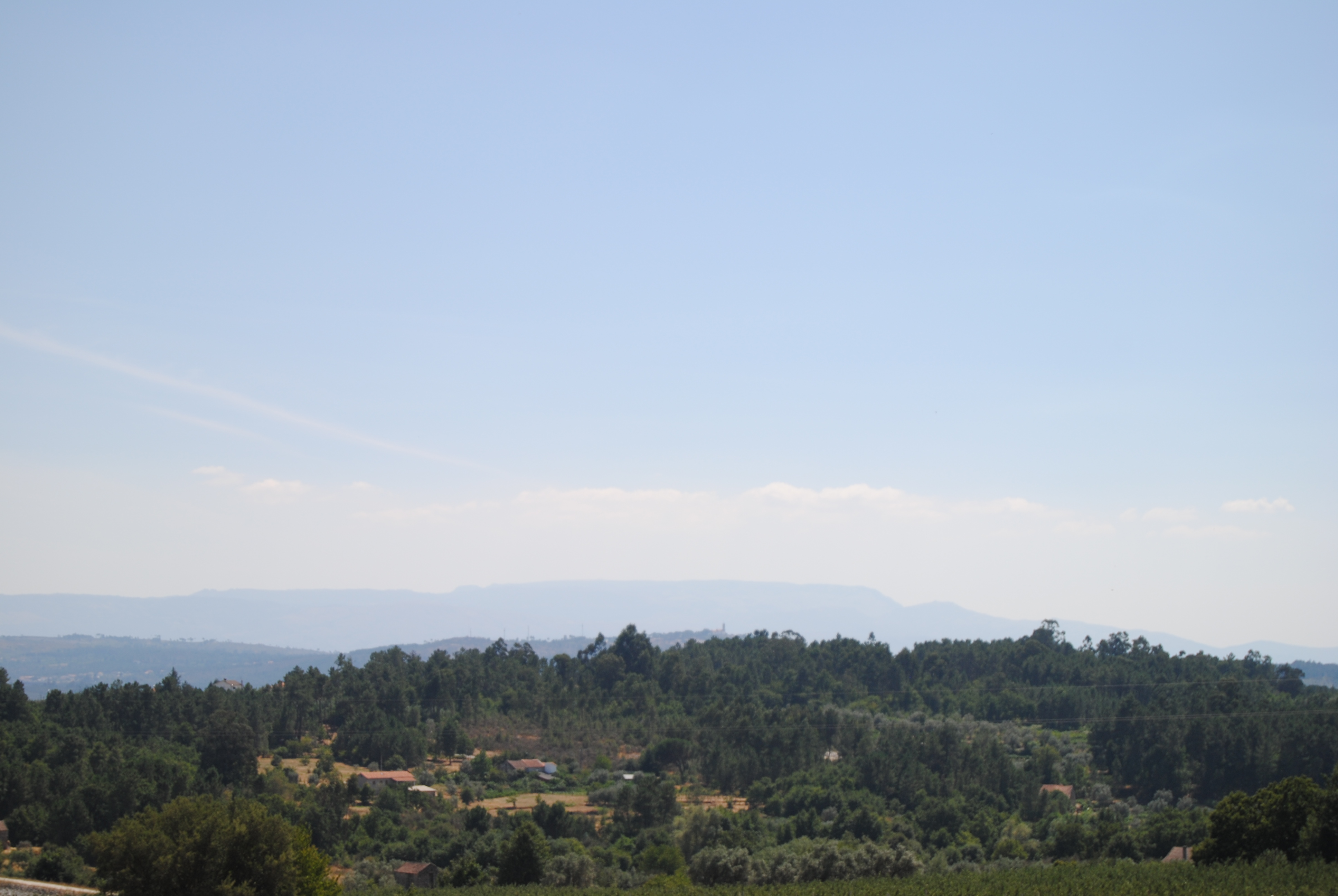 Vista Oeste -Serra da Estrela